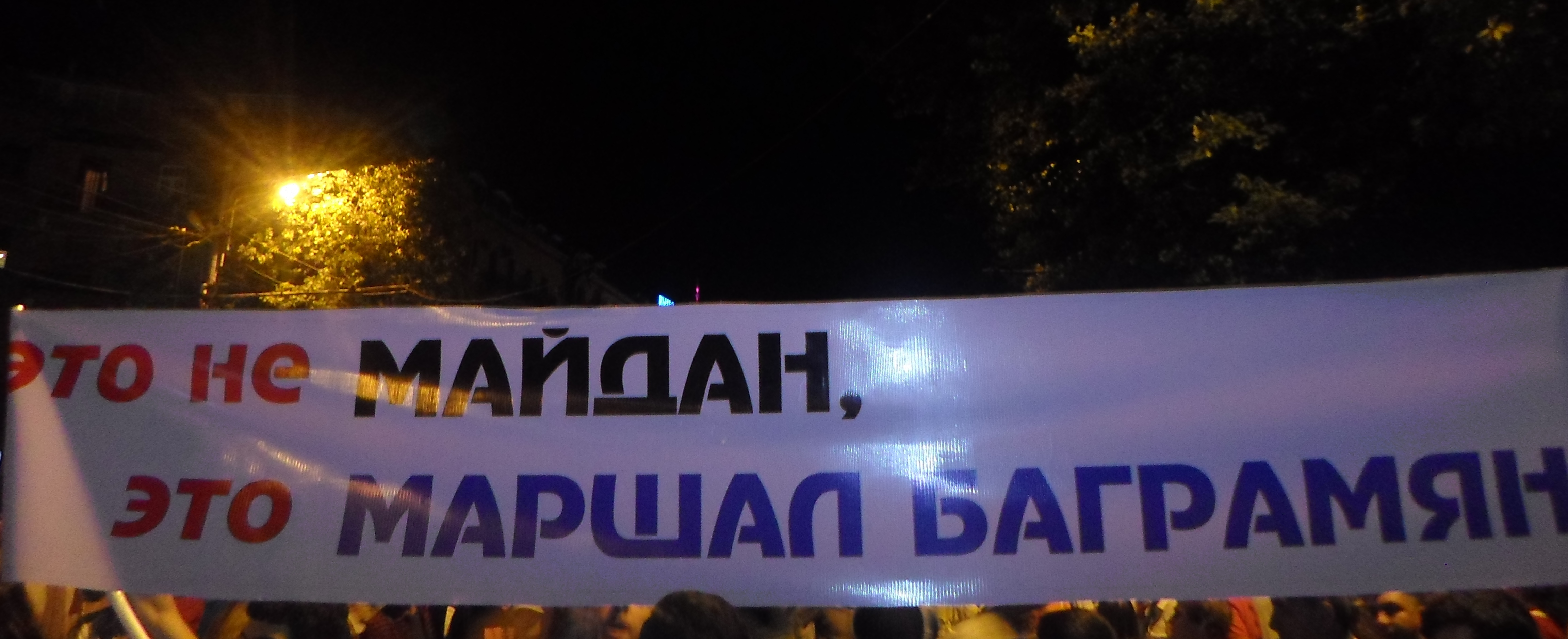 Բողոքի պլակատ ուղղված Եվրոմայդանի հետ համեմատություններին